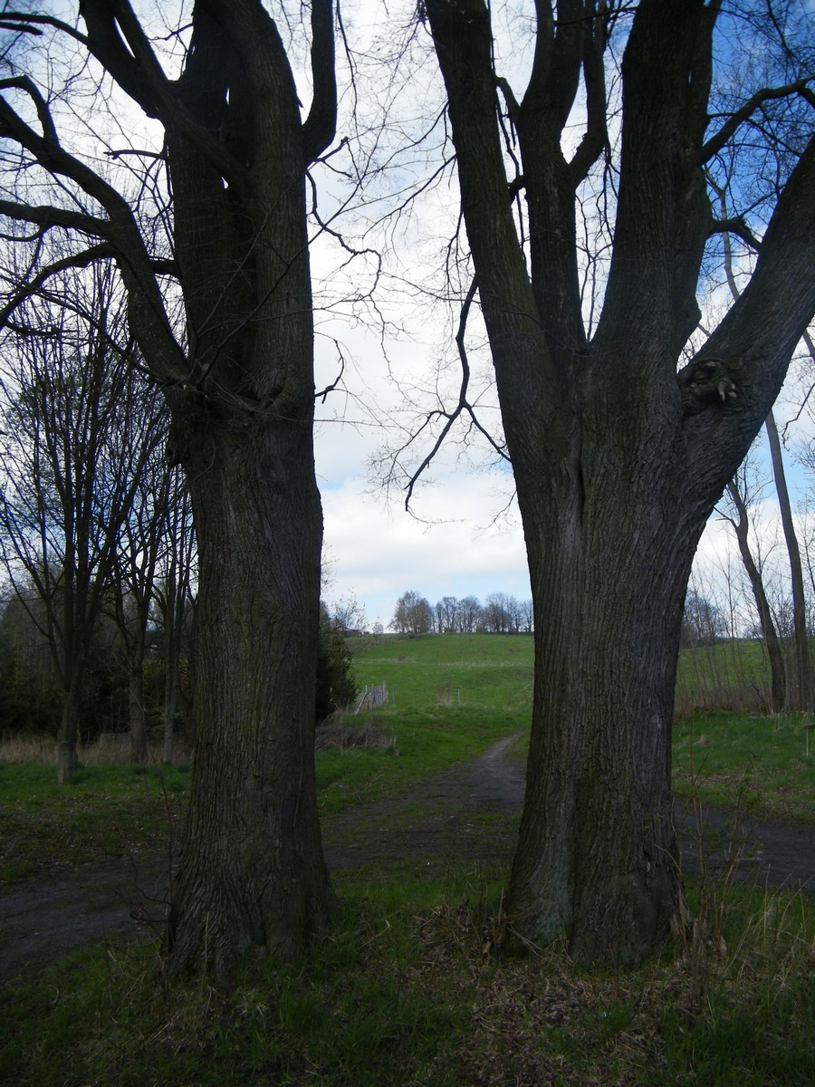 Místo, kde stávala Melchiorova kaple